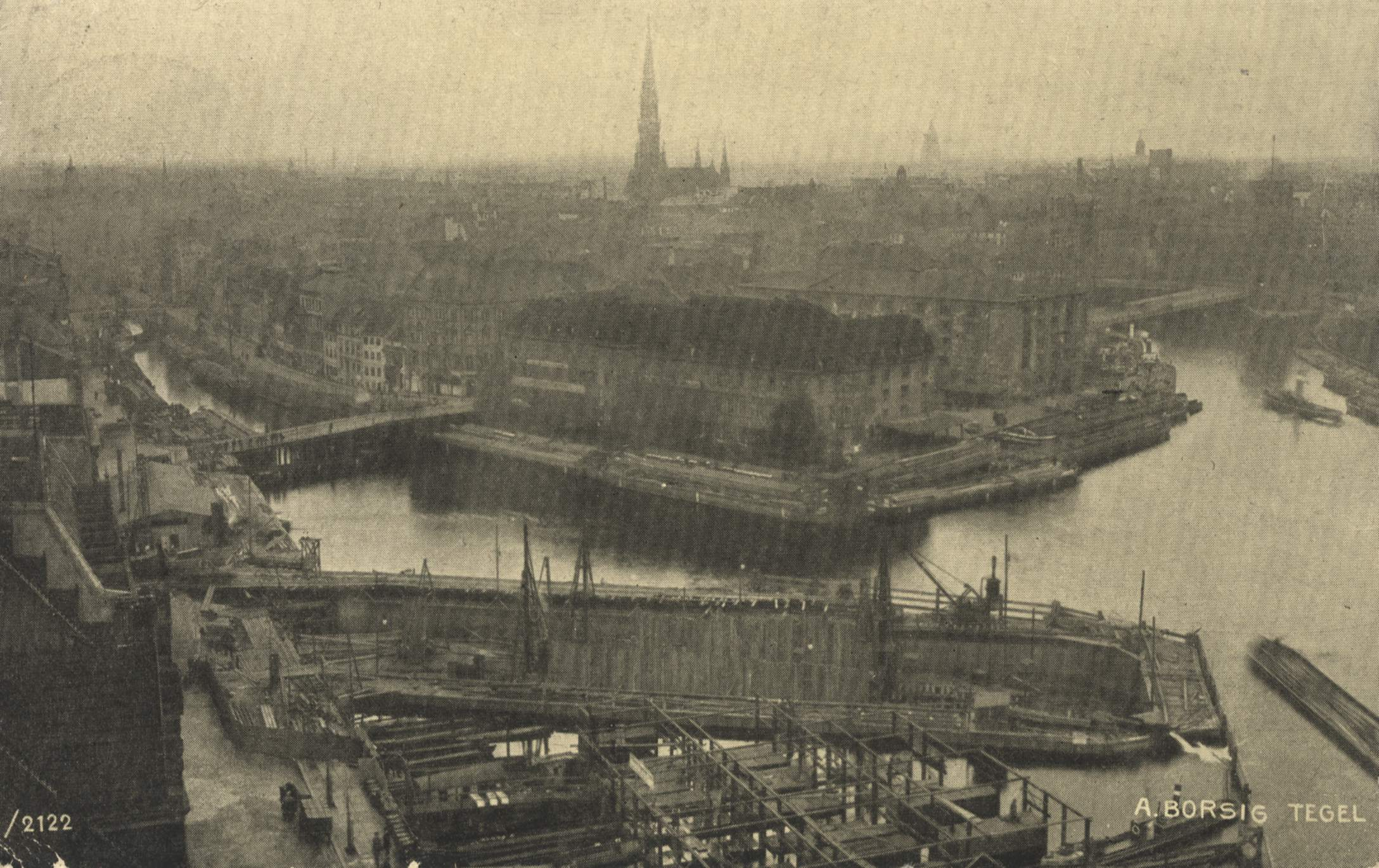 Baugrube der U-Bahn.Linie 2 im Flussbett der Spree in Berlin-Mitte. Dahinter die Fischerinsel.